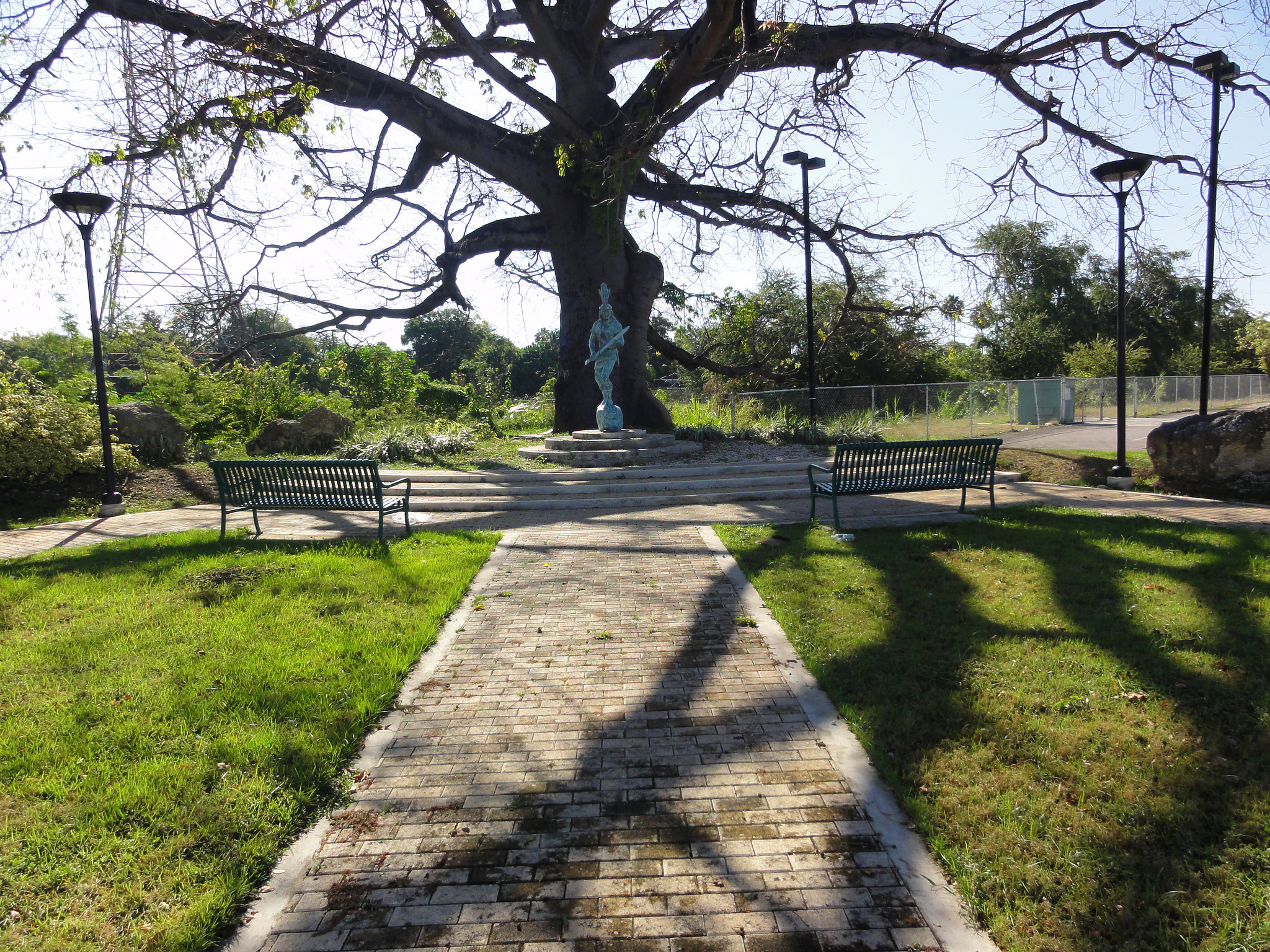 Parque Monumento Agüeybaná II, El Bravo, en la interseccion del Ponce Bypass y la Ave. Hostos, barrio Playa, Ponce, Puerto Rico